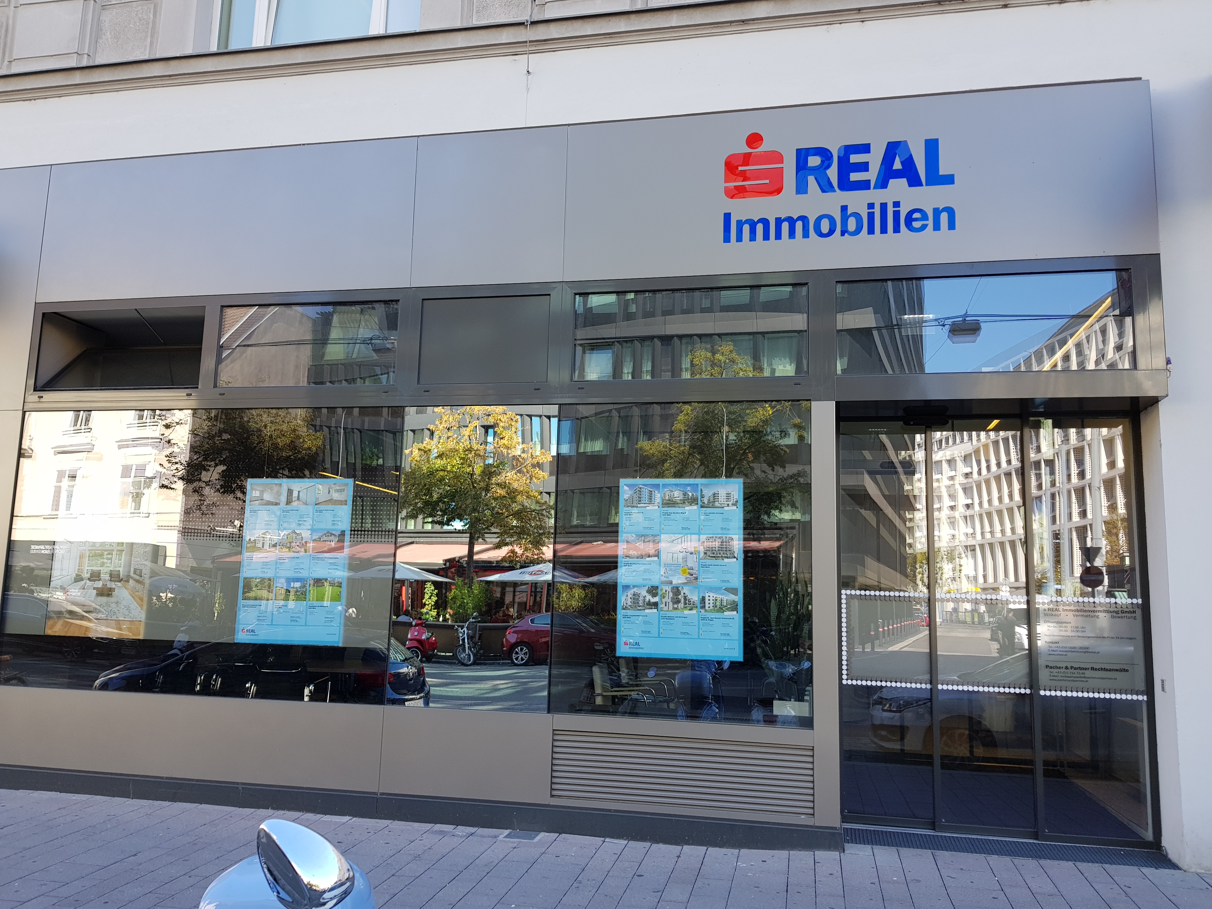 s REAL Zentrale, Landstraßer Haupstraße 60, 1030 Wien